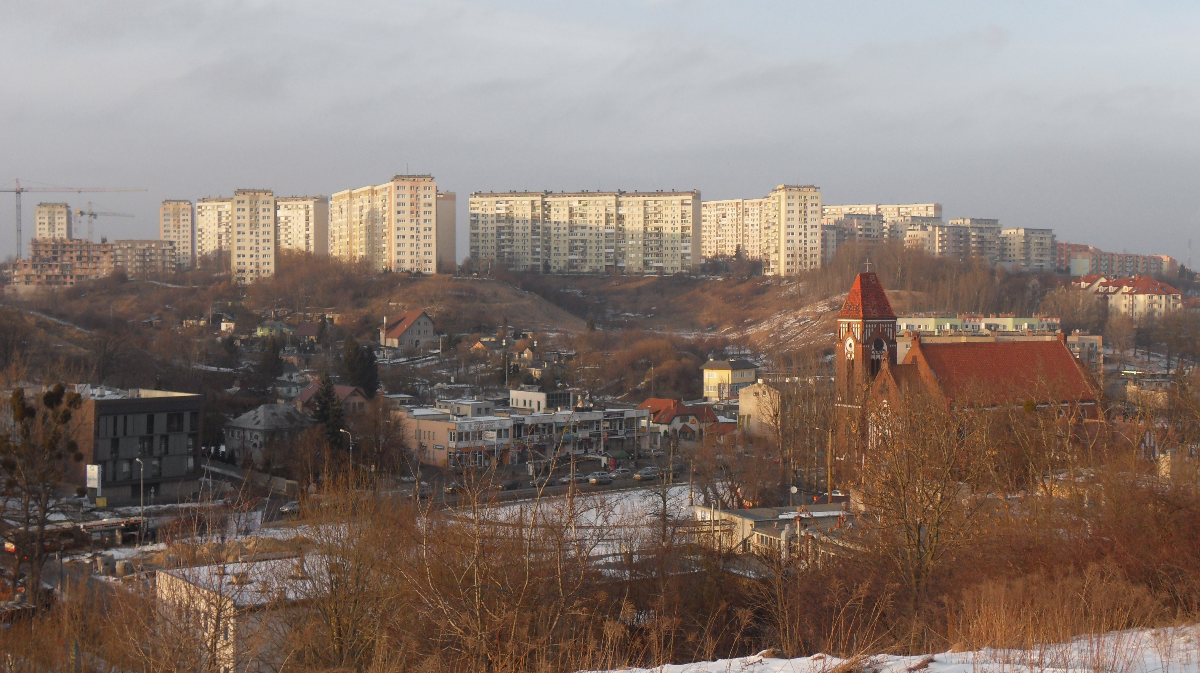 Gdańsk Suchanino, widok z południa, ze Wzgórza Mickiewicza. W dole ul. Kartuska na Siedlcach (Emaus) i kościół p.w. św. Franciszka z Asyżu.